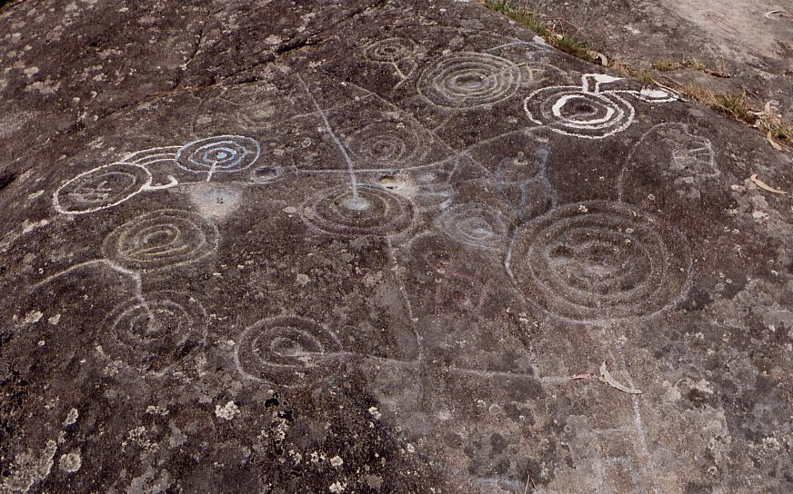 Pétroglyphes, motifs circulaires typiques Galice, Espagne